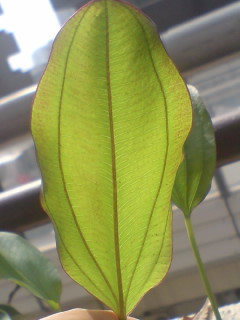 エキノドルス・アフレイムの成長して緑色になった葉（水上葉）. Echinodorus aflame closeup photo. Cultivated by Aquaflora in Nederland. The leaf cultivated in land. It is old leaf is green color.